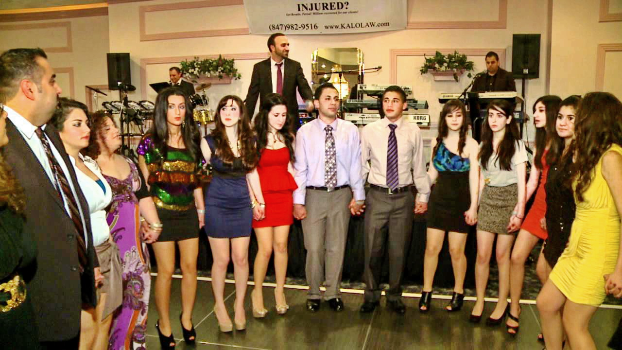 Assyrians dancing khega in a party.